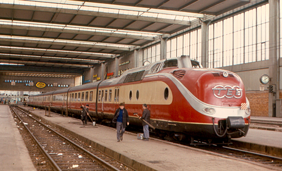 VT 11.5 im April 1970 in München.